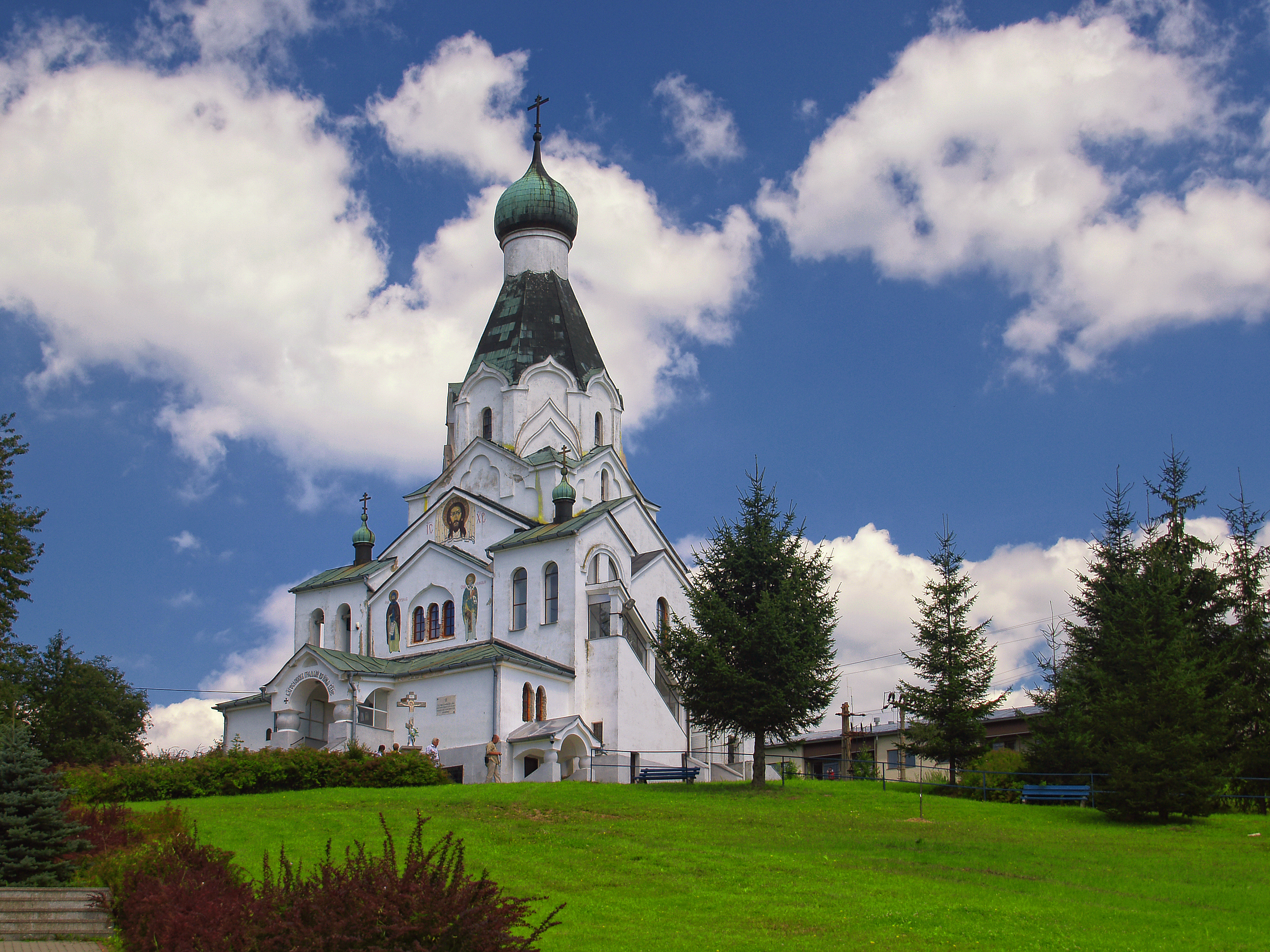 Medzilaborce - Eglise orthodoxe du Saint-Esprit